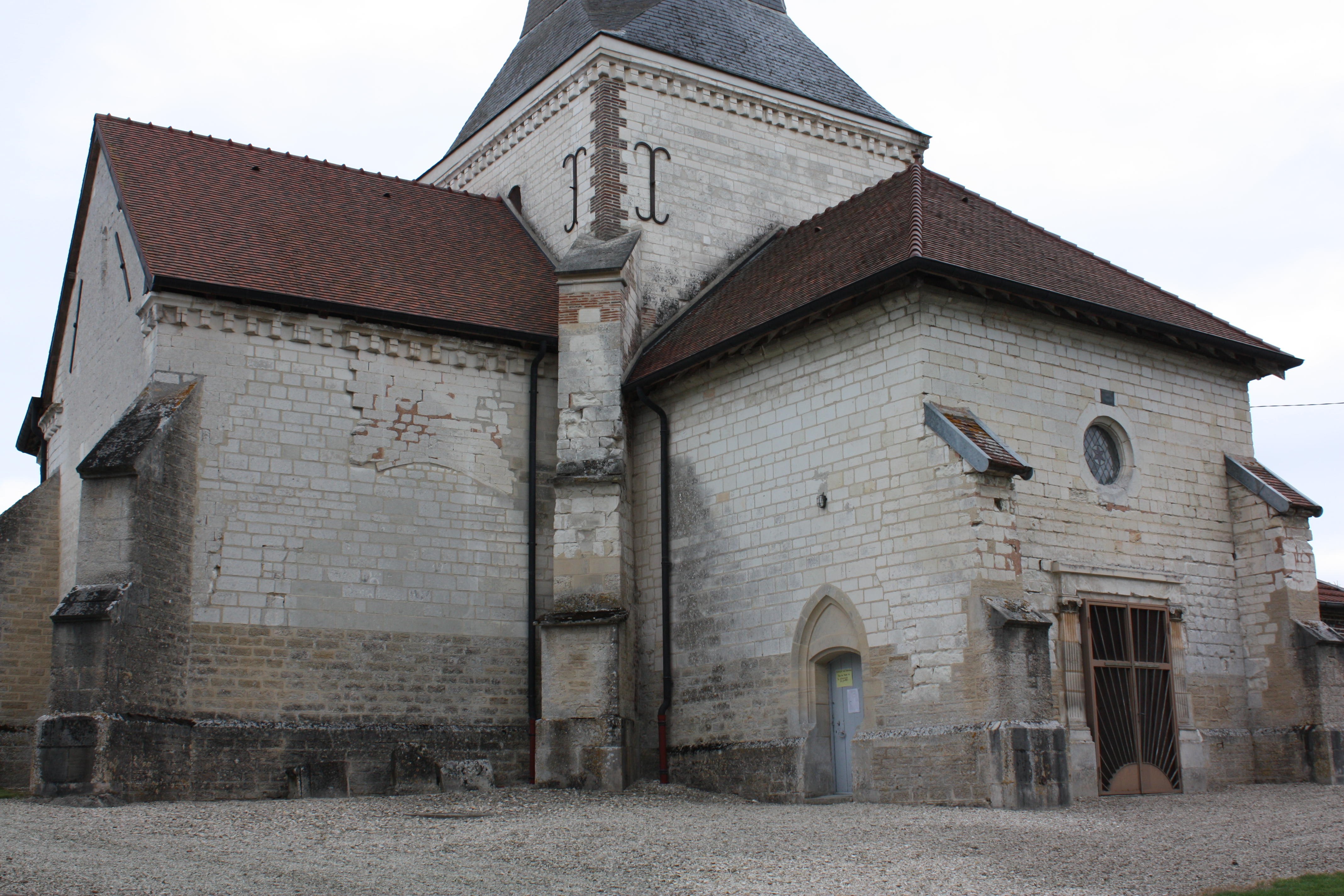 Montsuzain, l'église vue du Nord-Ouest